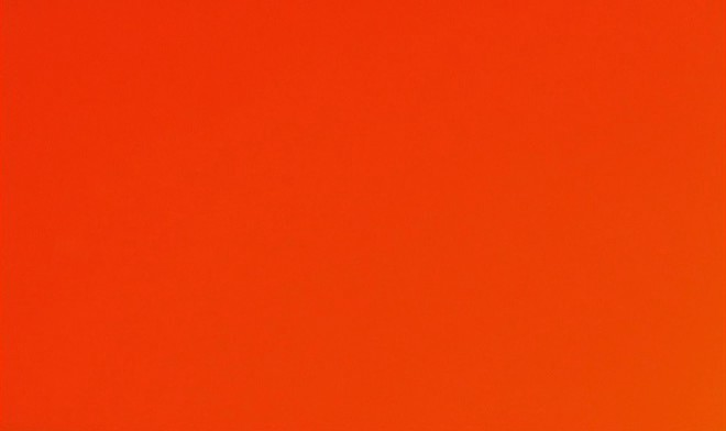 Примерно так выглядит экран на 41:31 фильма "Двойная жизнь Вероники" (1991)